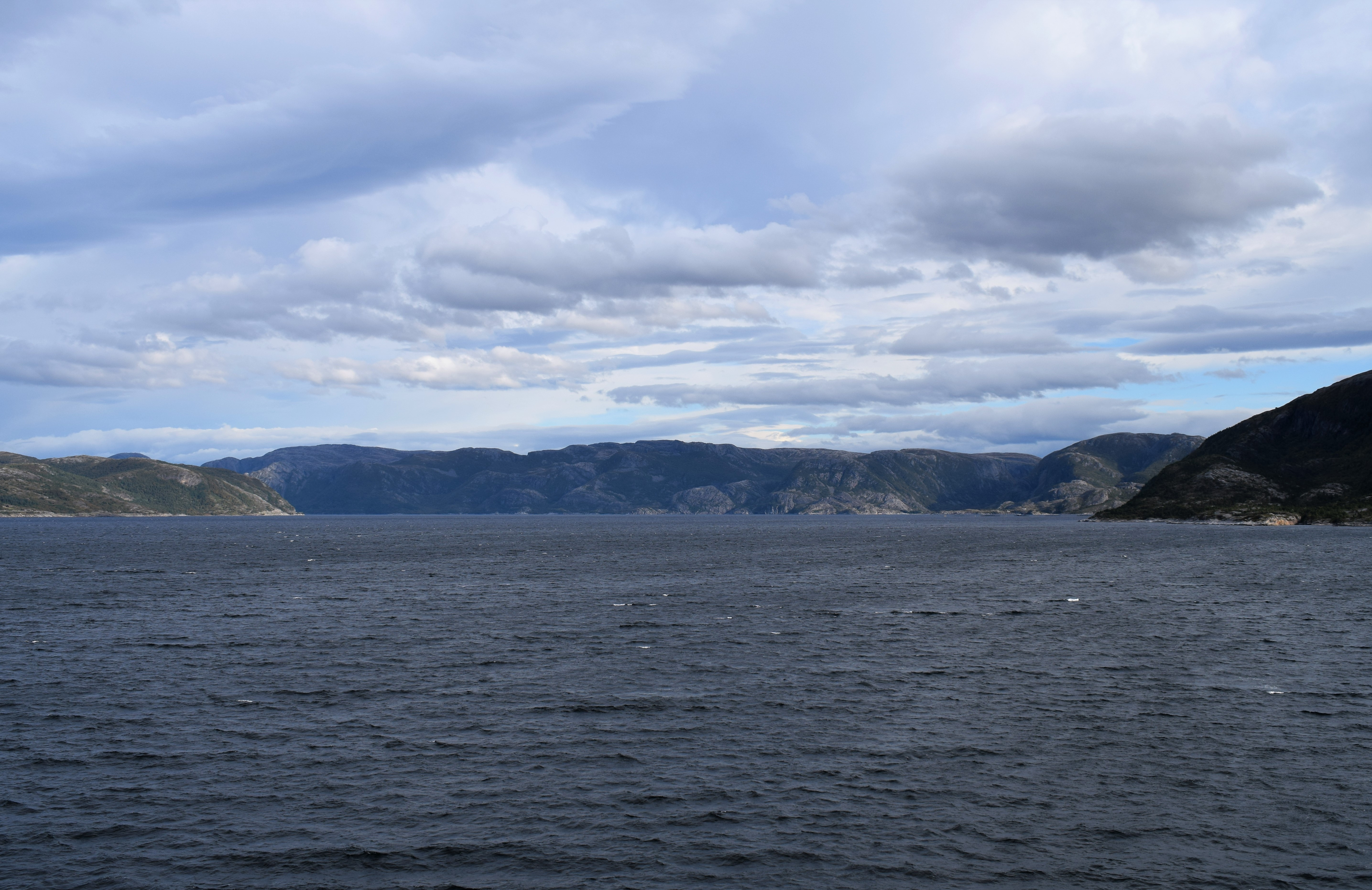 Skjørafjorden på Fosen skiller Stoksund i sørvest fra Roan i nordøst.